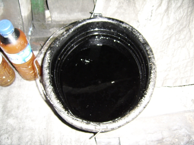 Asap Cair Kasar